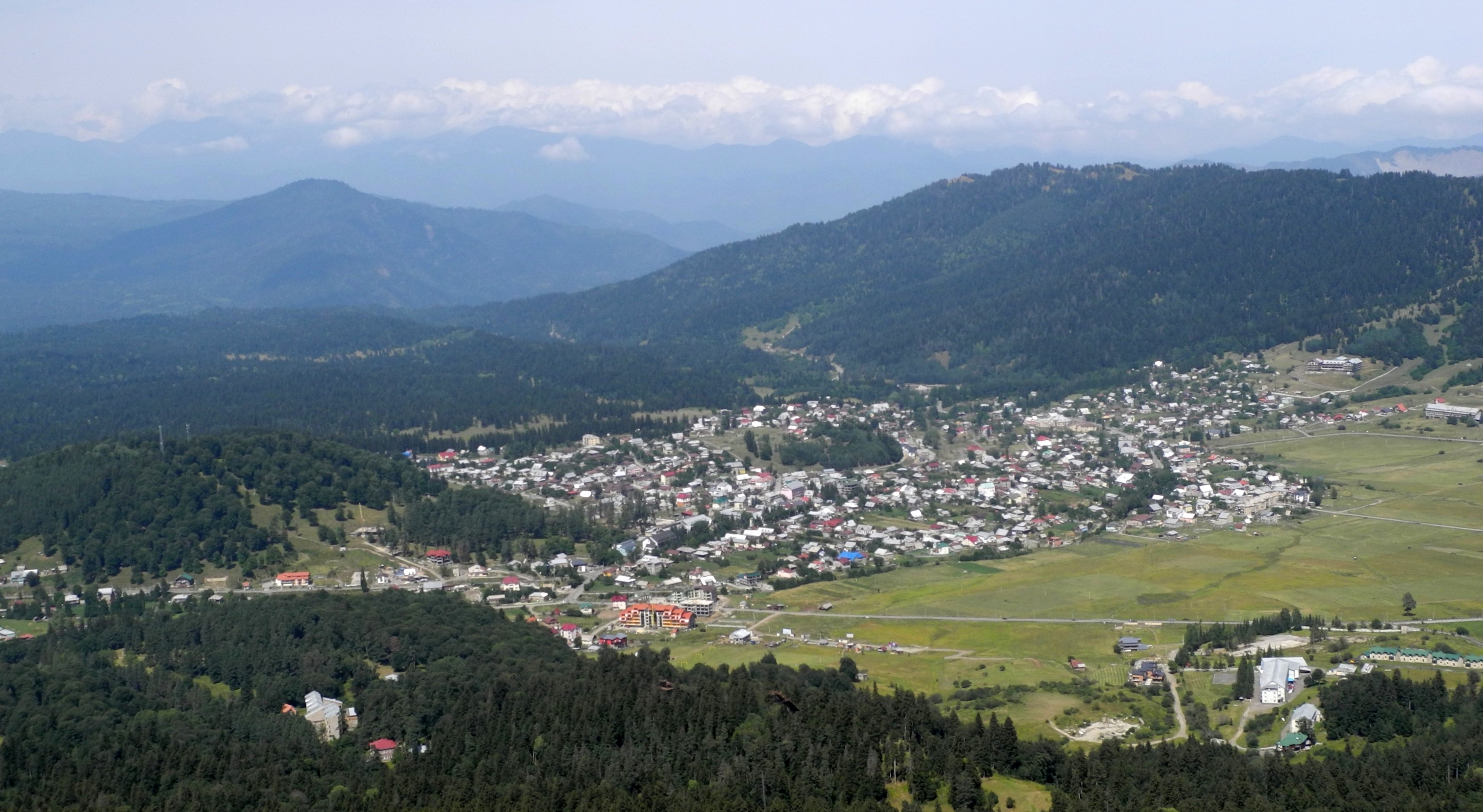 Bakuriani - Ort vom Kochta-Hügel